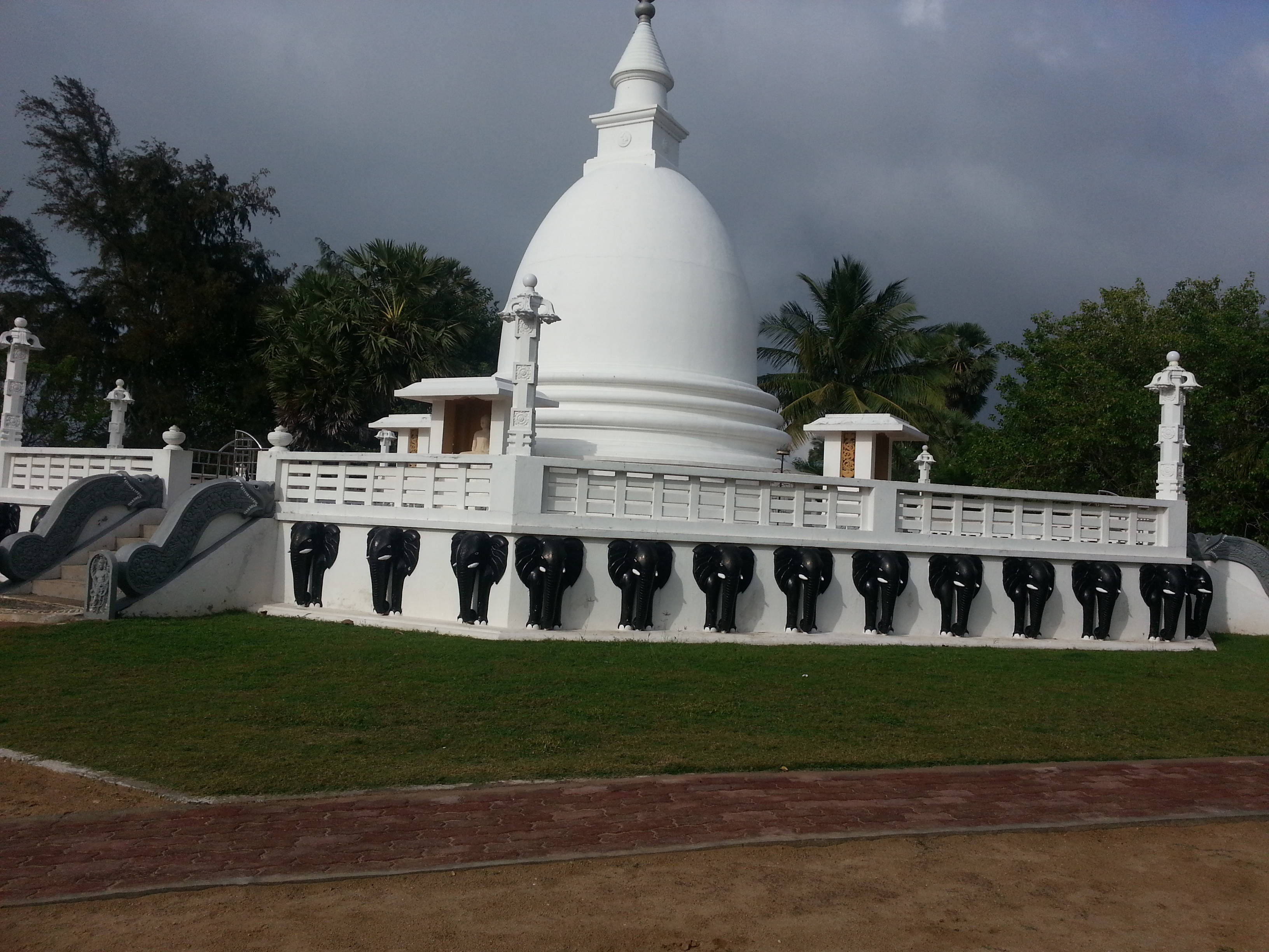 ஜம்புகோளவிகாரை